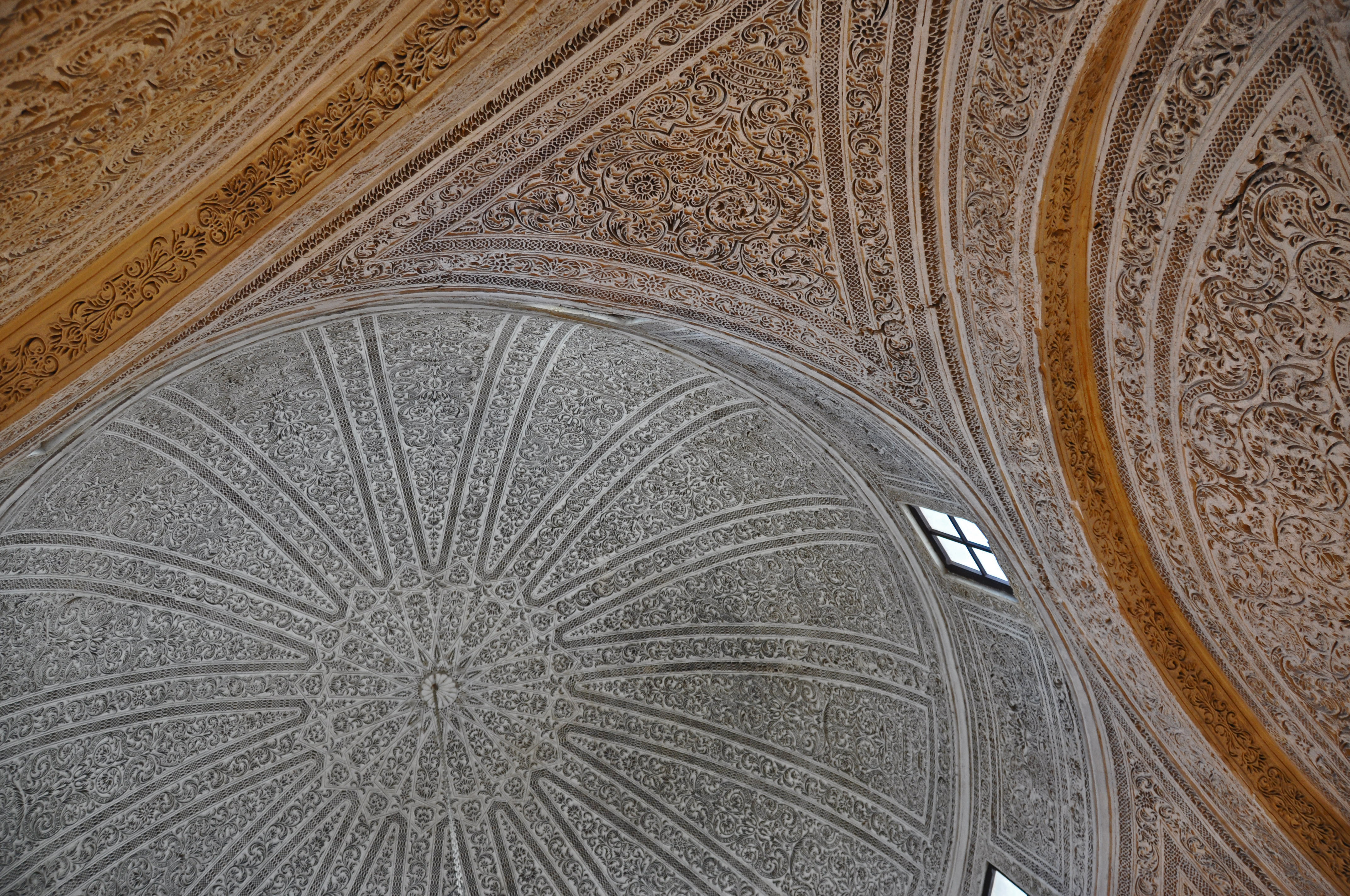 Vue intérieure montrant la décoration en stuc ciselé de la coupole qui coiffe le Tourbet El Bacha ou mausolée d'Ali Ier Pacha à Tunis, en Tunisie.